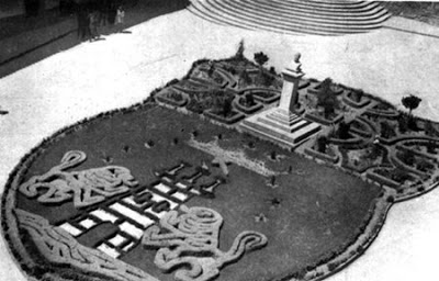 Escudo Hellín antiguo